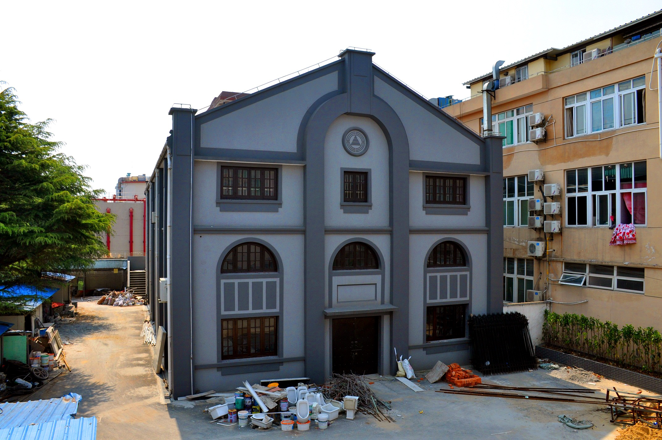 三林中学康乐堂 （旧西式体育馆，今小礼堂） 1936年